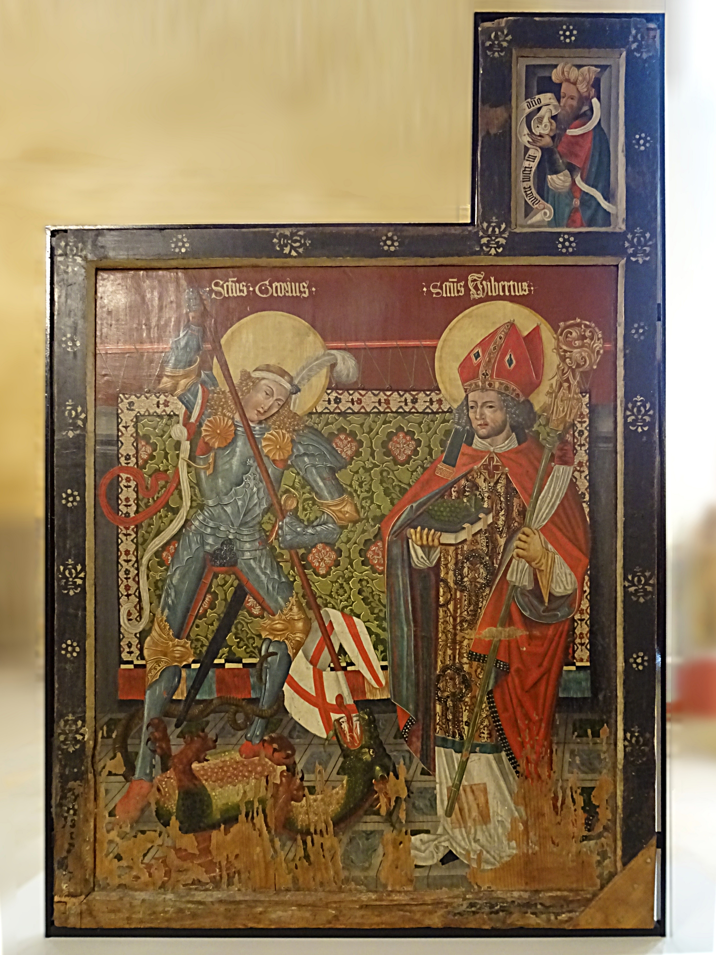 Vierflügeliger Schnitzaltar von 1504 aus Saalfelder Schule der Dorfkirche Ammerbach. Der linke äußere Seitenflügel zeigt bei geschlossenem Altar den Hl. Georg und den Hl. Wigbert. In der Ecküberhöhung rechts der Spruch des Psalmensängers. Das Original befindet sich zur Zeit in der Marienkirche Mühlhausen.